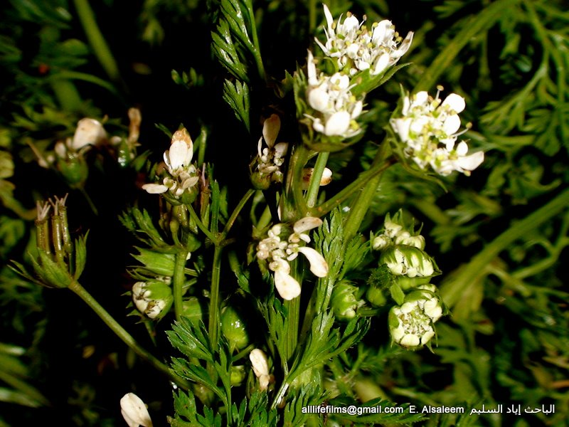 زهر الحرتمنة